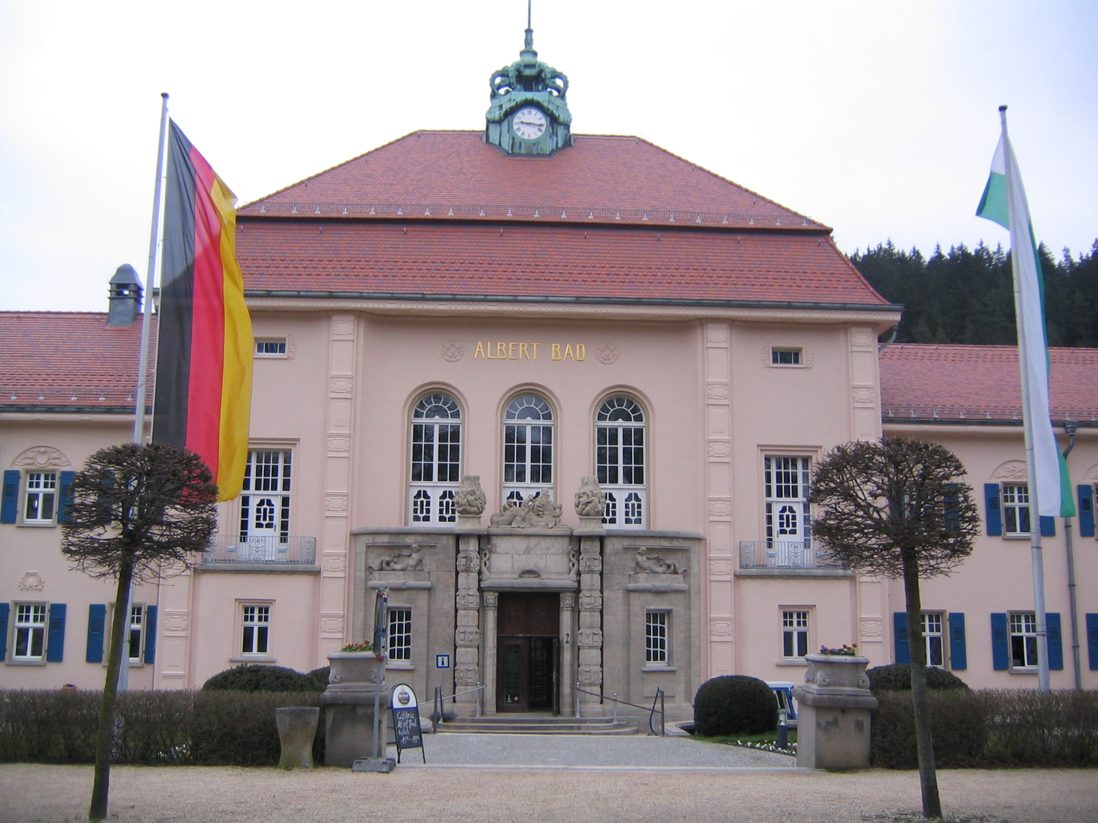 Portal des König-Albert-Bads in Bad Elster